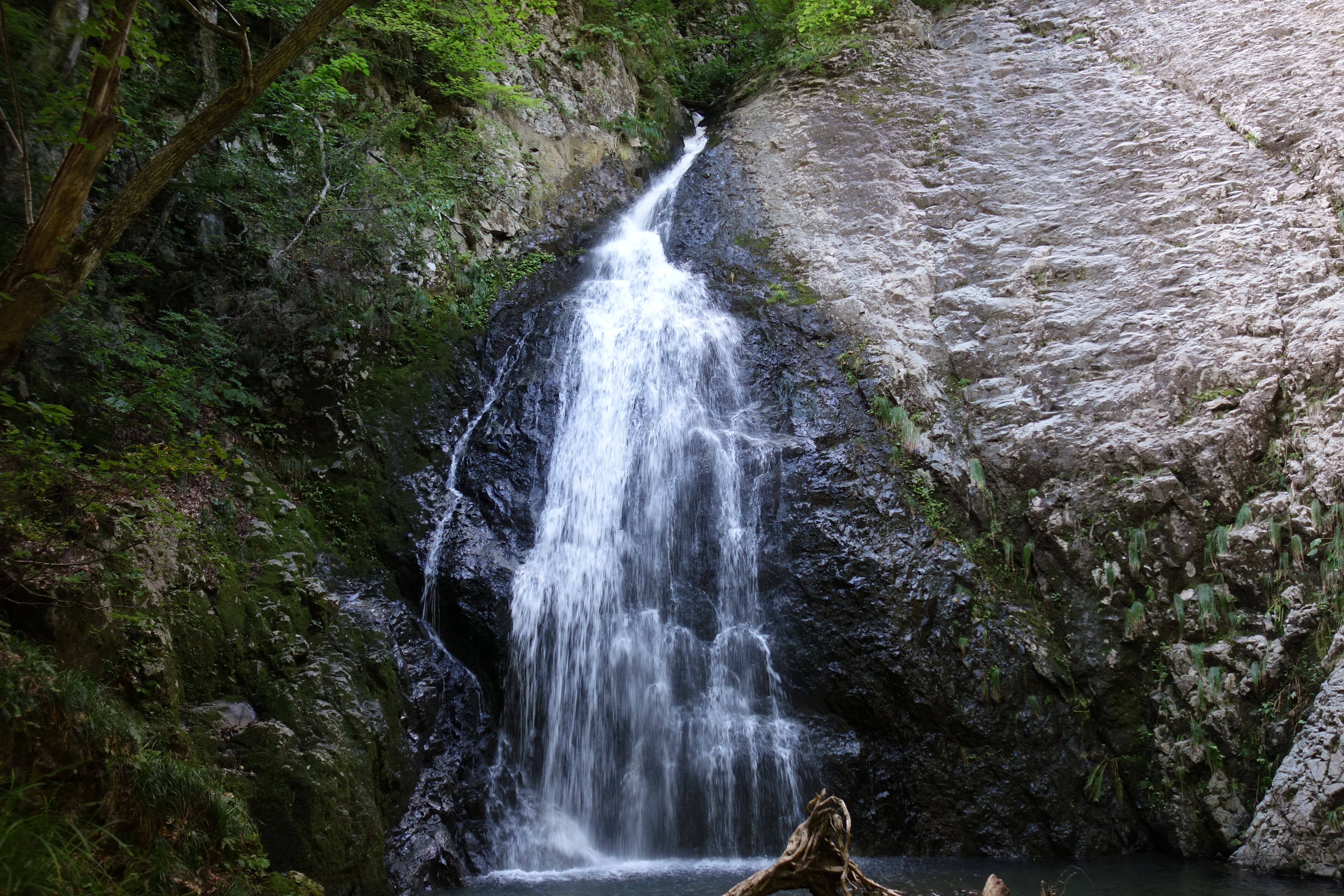 白糸の滝（秋田県北秋田市小又峡)